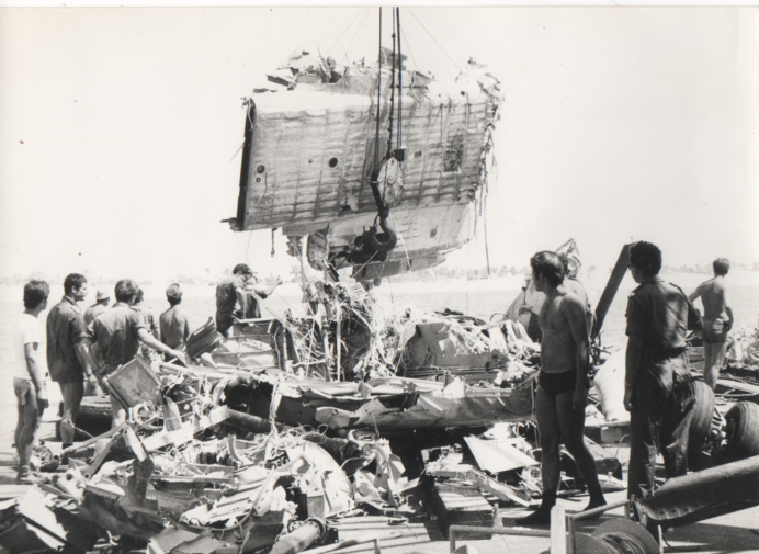 חילוץ שרידי מסוק שנפל לים בקרבת רפיח